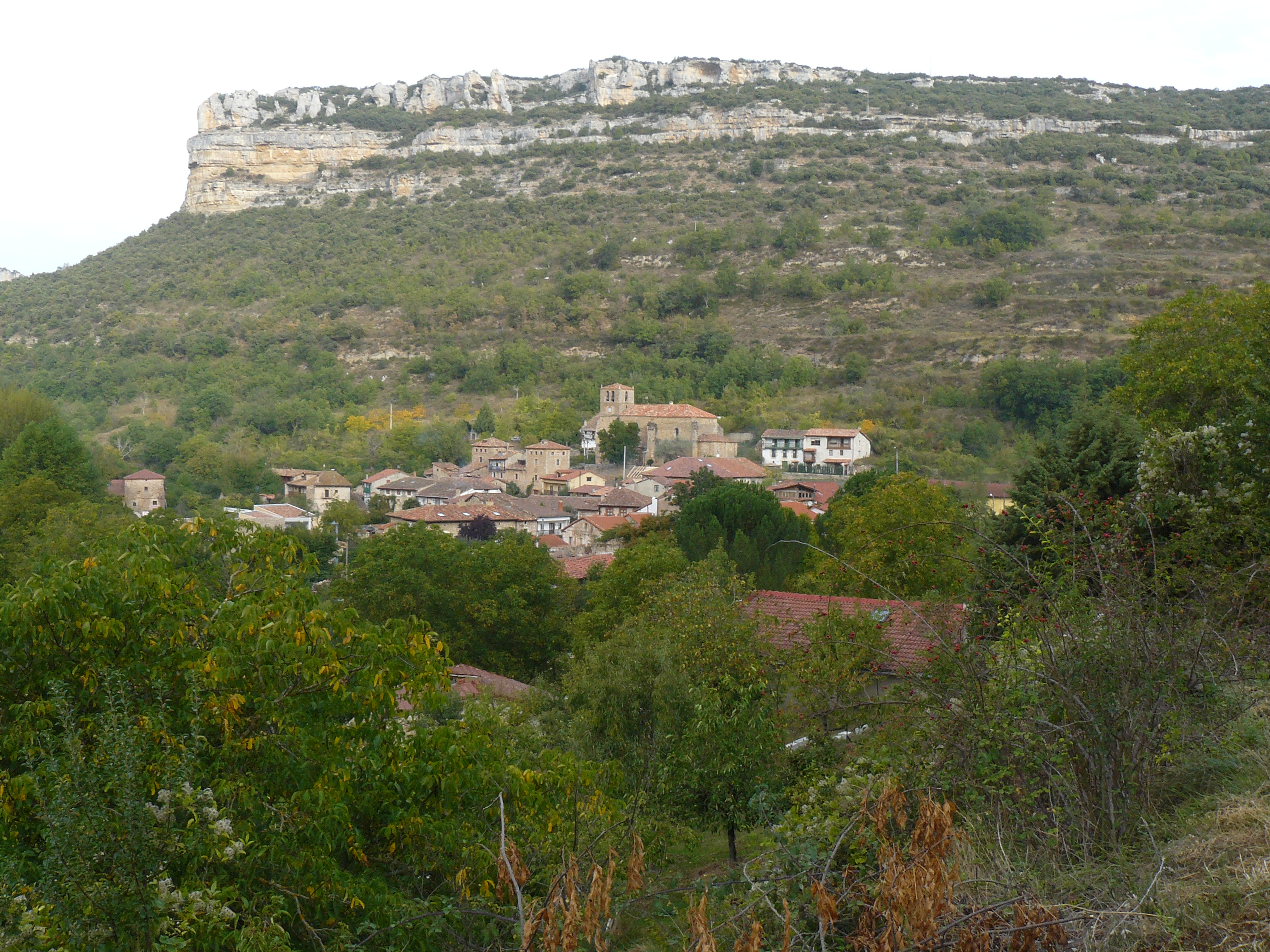 Escalada, Burgos.